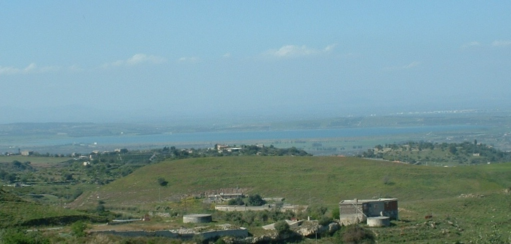 Biviere di Lentini (Lentini Lake), view from S.P. (provincial road)Carlentini - Pedagaggi.